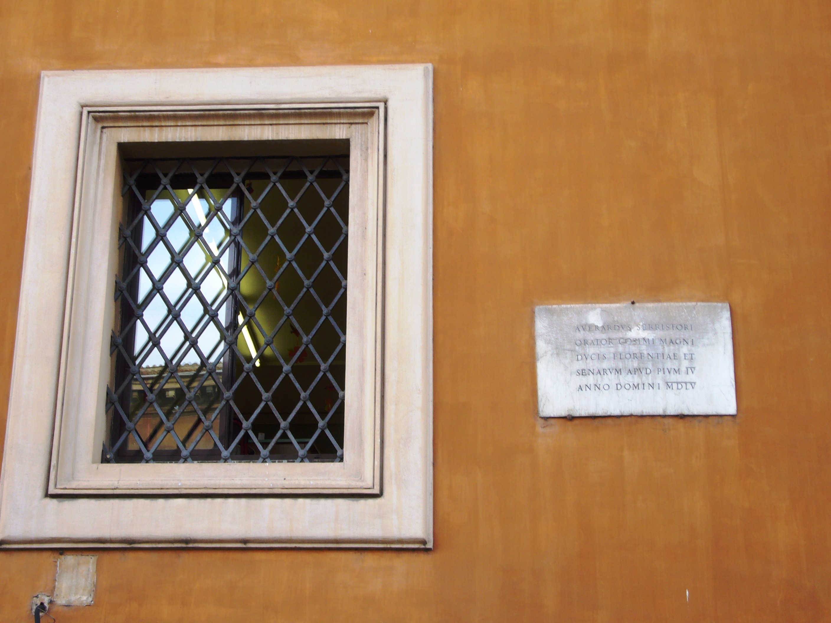 Roma, via della Conciliazione. Memoria di Averardo Serristori (1555) sul suo palazzo poi caserma delgli zuavi pontifici.